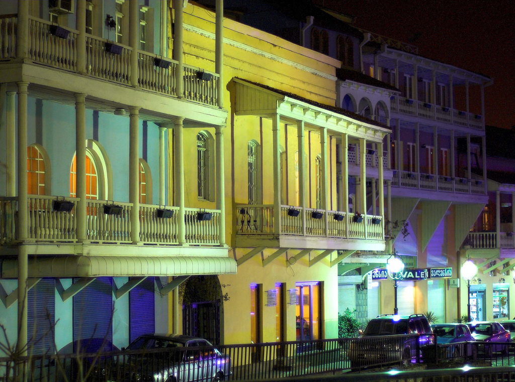 რესტავრირებული ქუთაისი